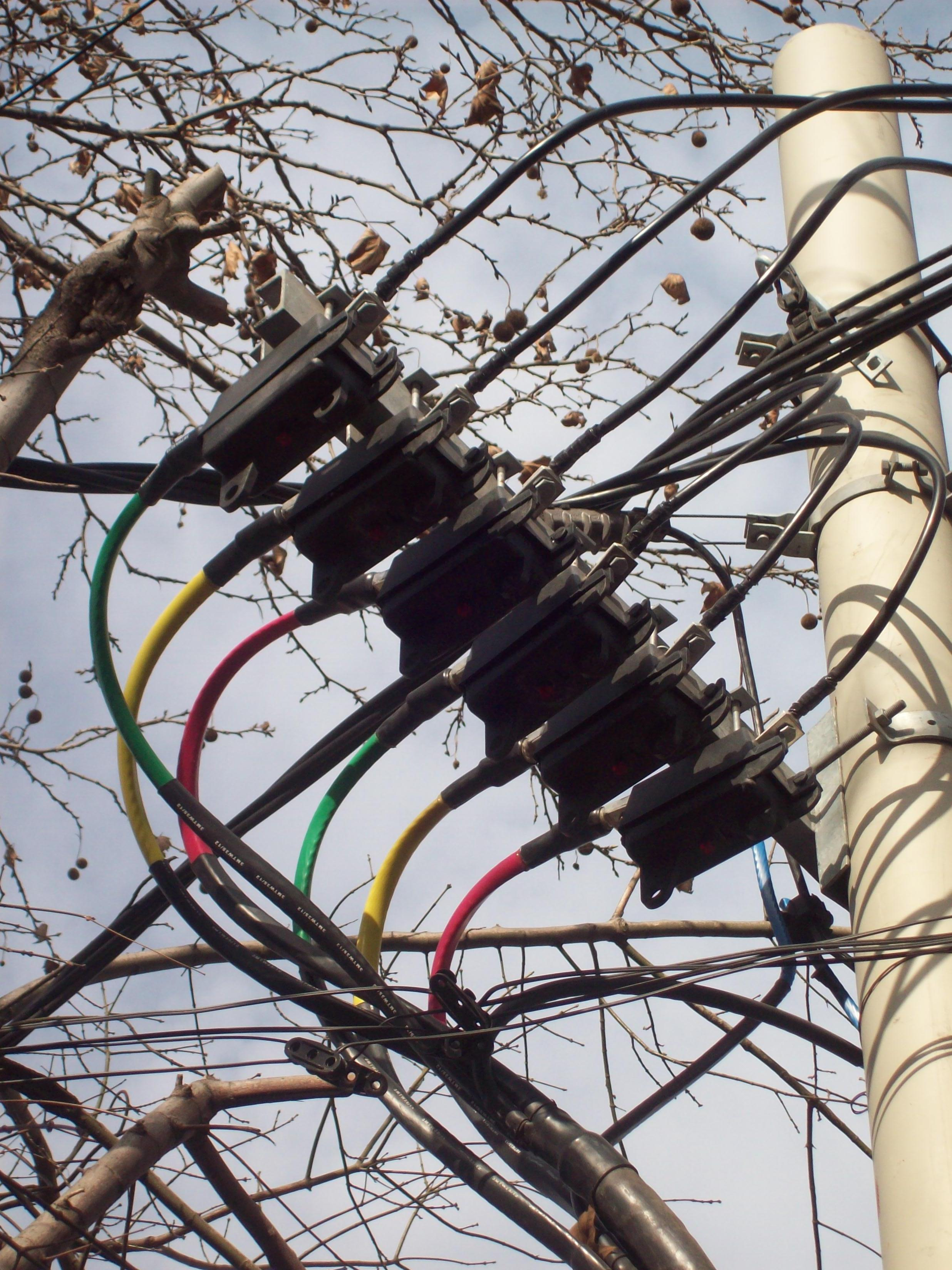 Poste con seis cajas de fusibles entre las calles Mitre y España de Florencio Varela.